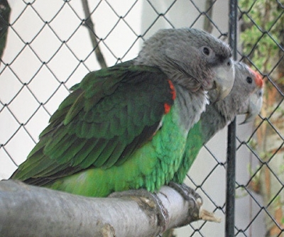 foto papouška kapského; autorka Alexandra Lerlová, zveřejněno s jejím souhlasem ze stránky Poicephalus fuscicollis suahelicus